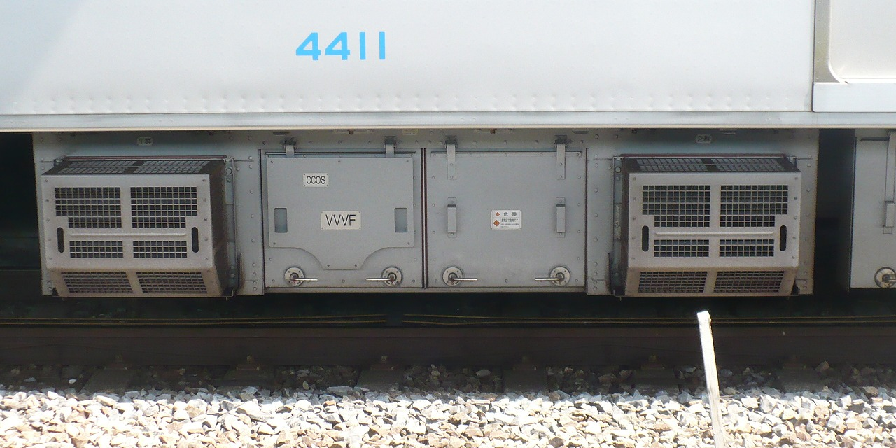 小田4000VVVF